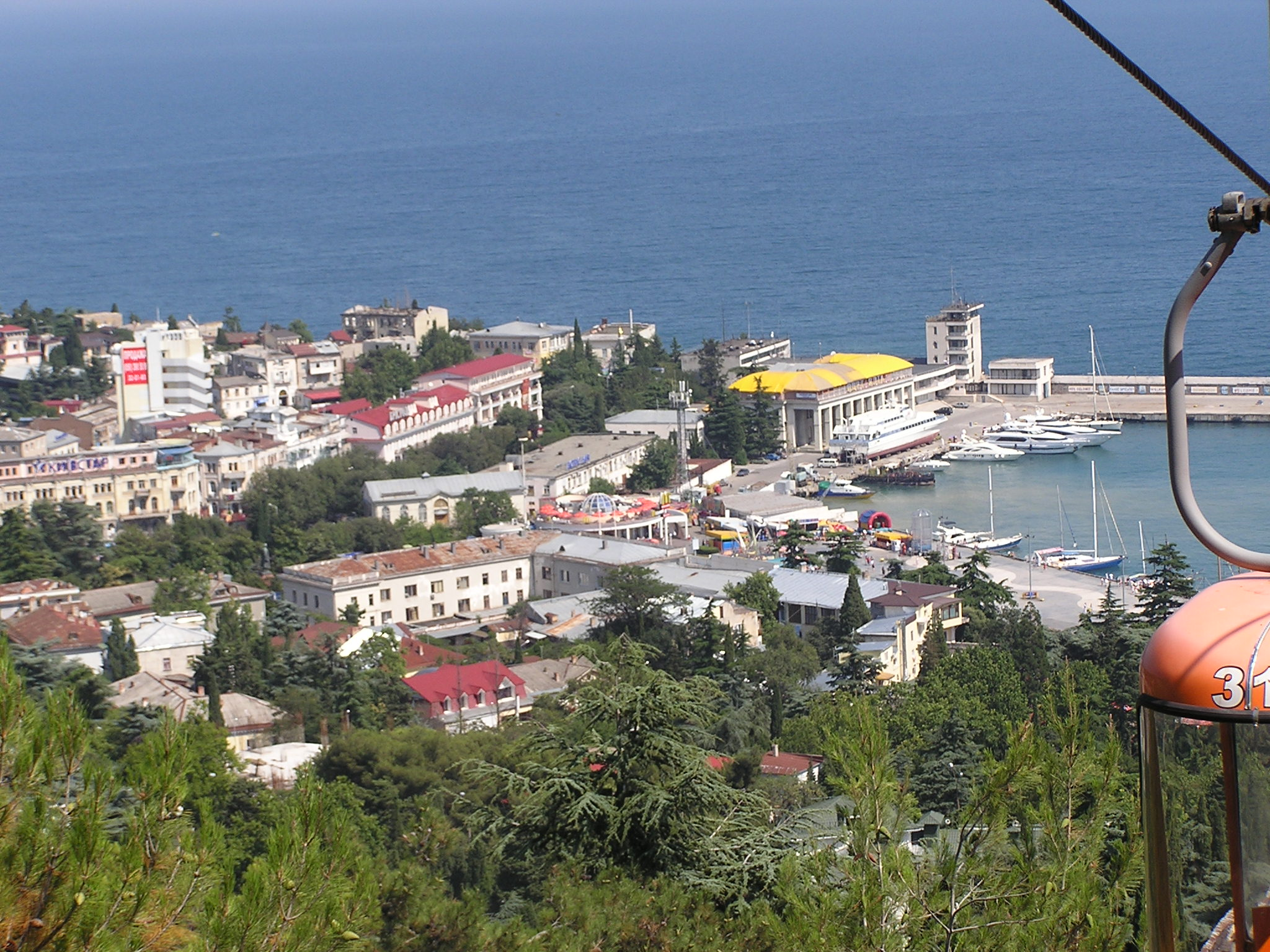 Ялта